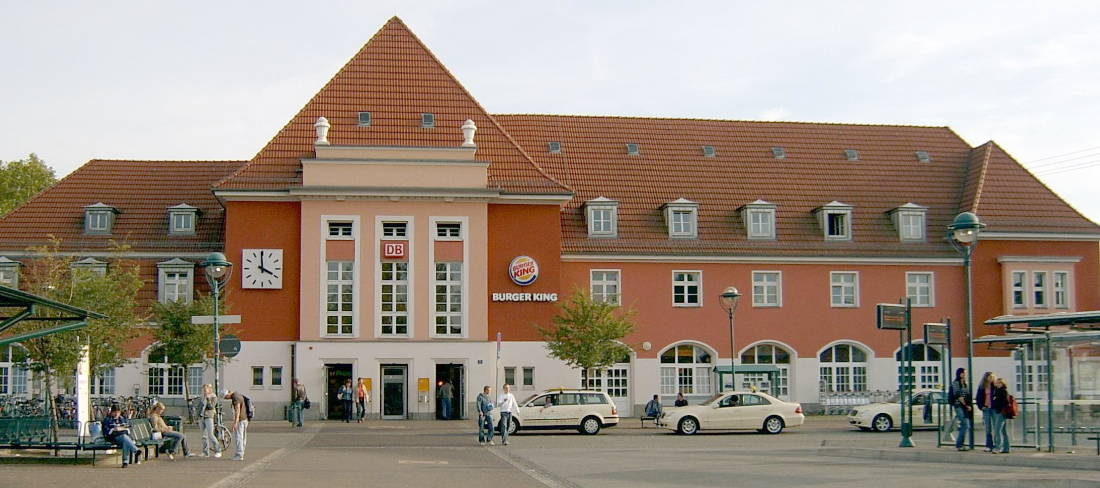 Gare zu Frankfurt Oder